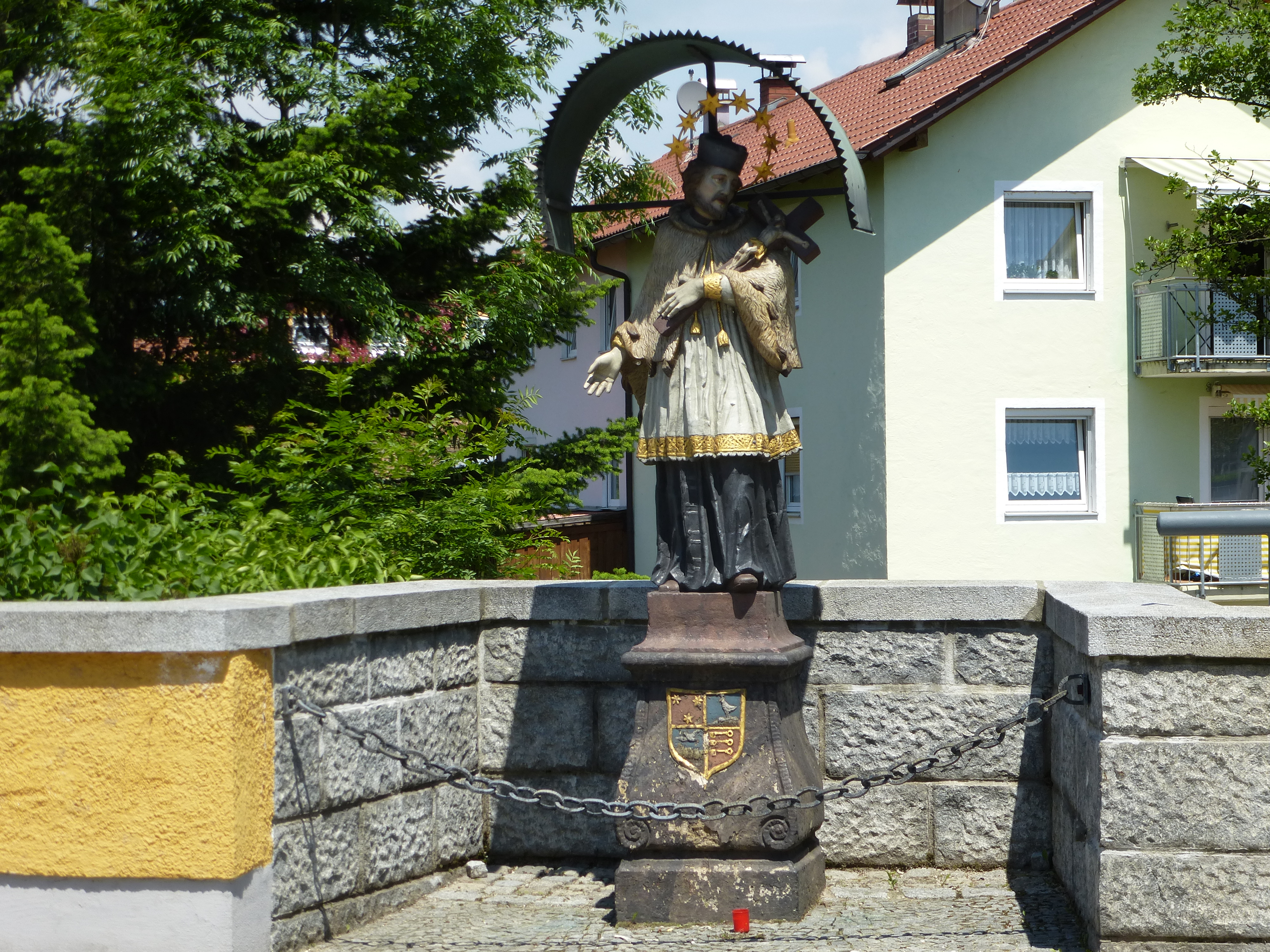 Figur des Hl. Nepomuk, Wiesent